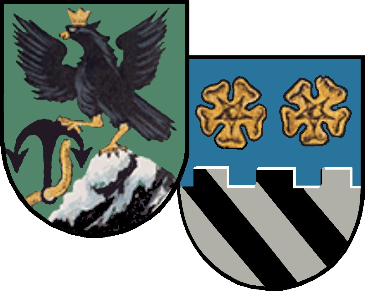 Wappen der Marktgemeinde Unzmarkt-Frauenburg im Bezirk Judenburg / Steiermark